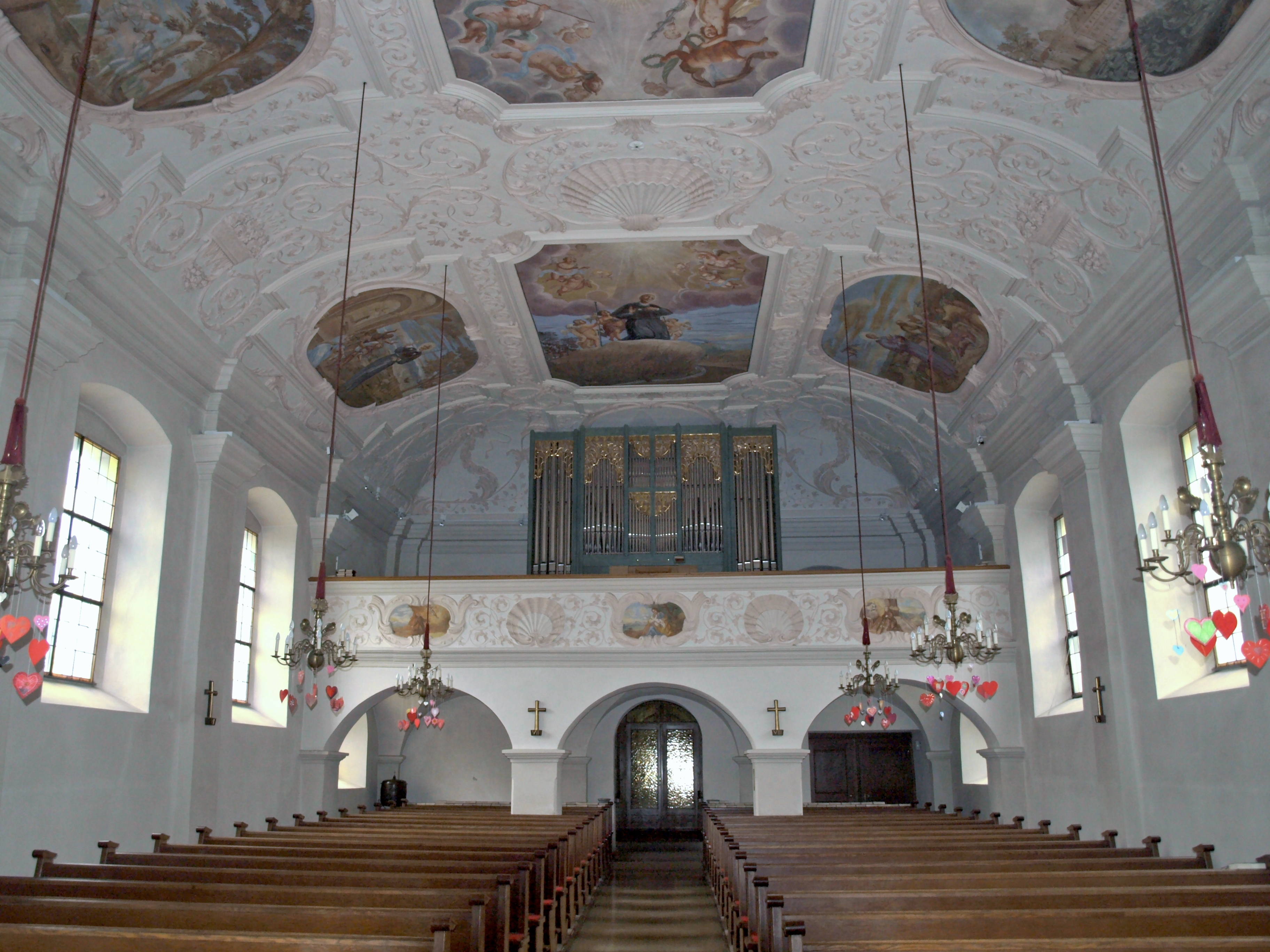 Kath. Pfarrkirche hl. Zeno und Friedhof